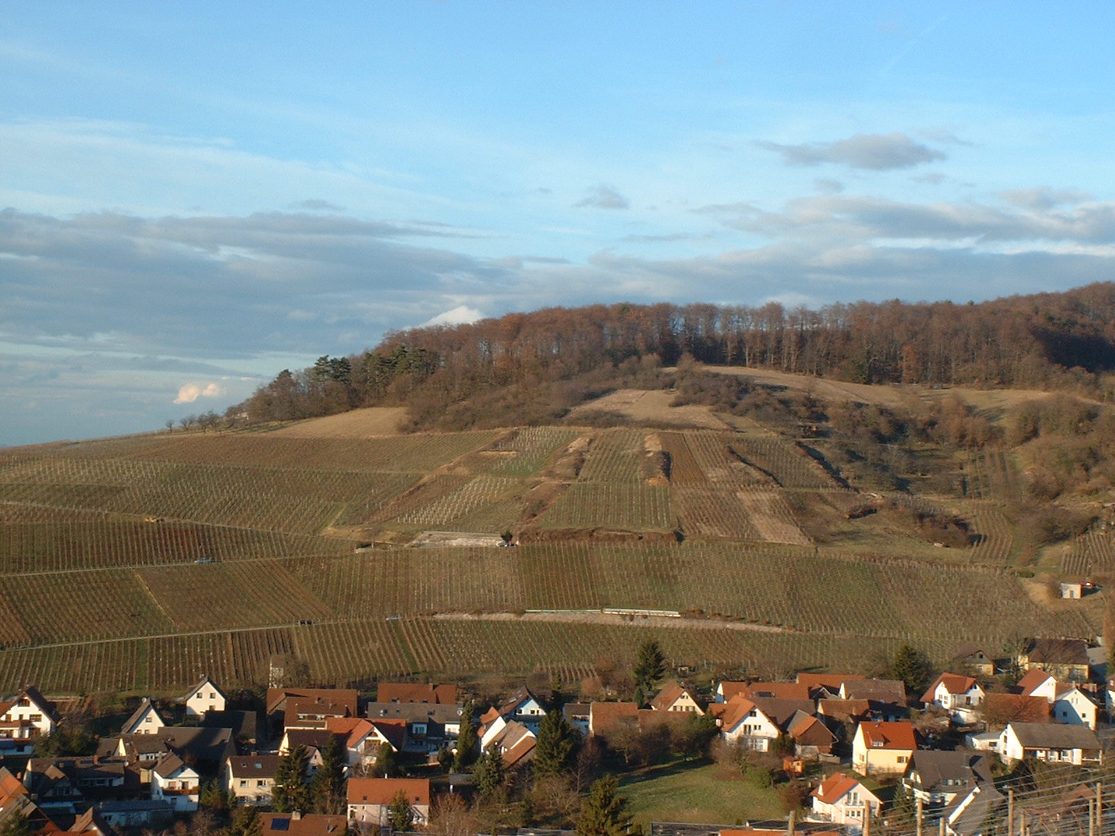 Ebringen mit dem Bohl, ein westlicher Nebengipfel des Schönbergs und Schauplatz des ersten Tages der Schlacht bei Freiburg im Dreißigjährigen Krieg.